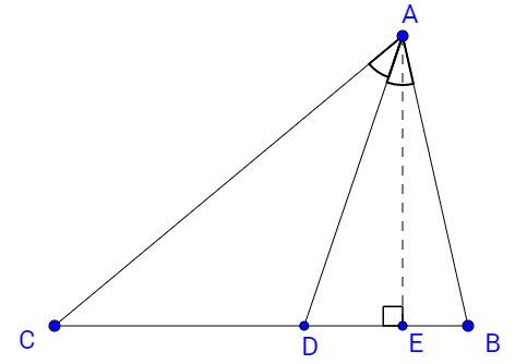 Зображення є ілюстрацією теореми про бісектрису та її доведення